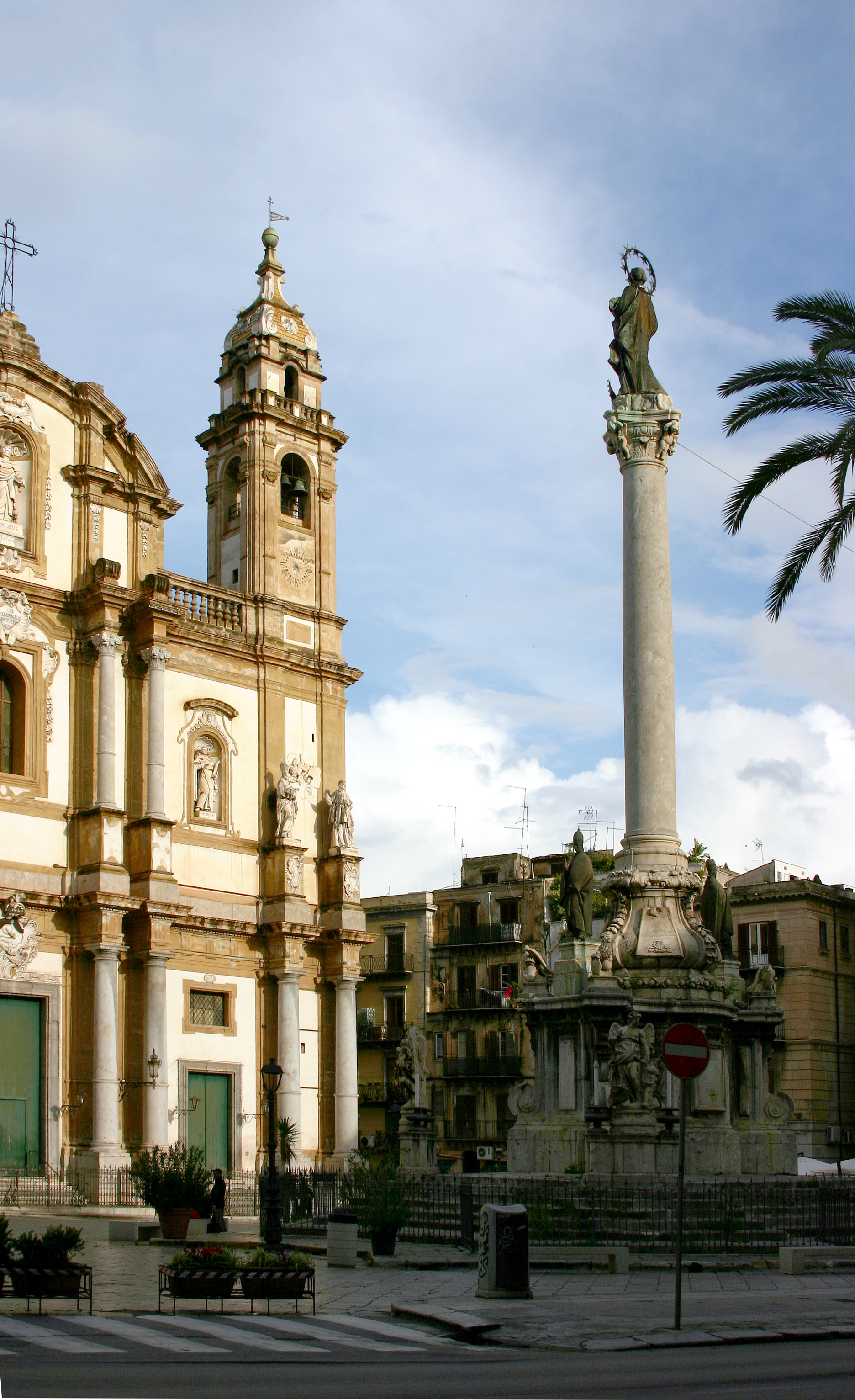 San Domenico - Palermo